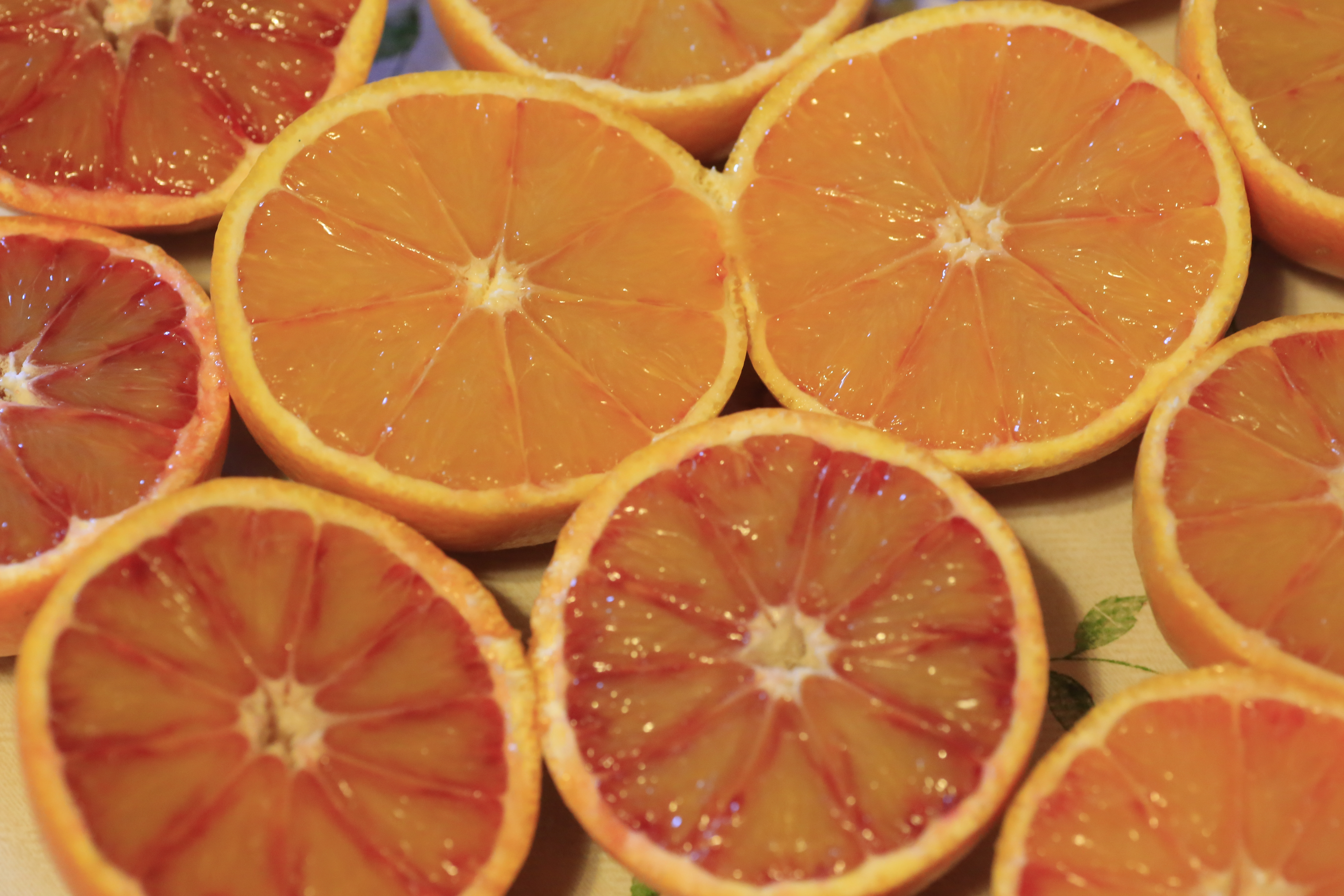 Arance tarocco